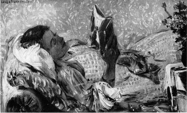 Lesende/ Lesendes Mädchen / Lesende Frau